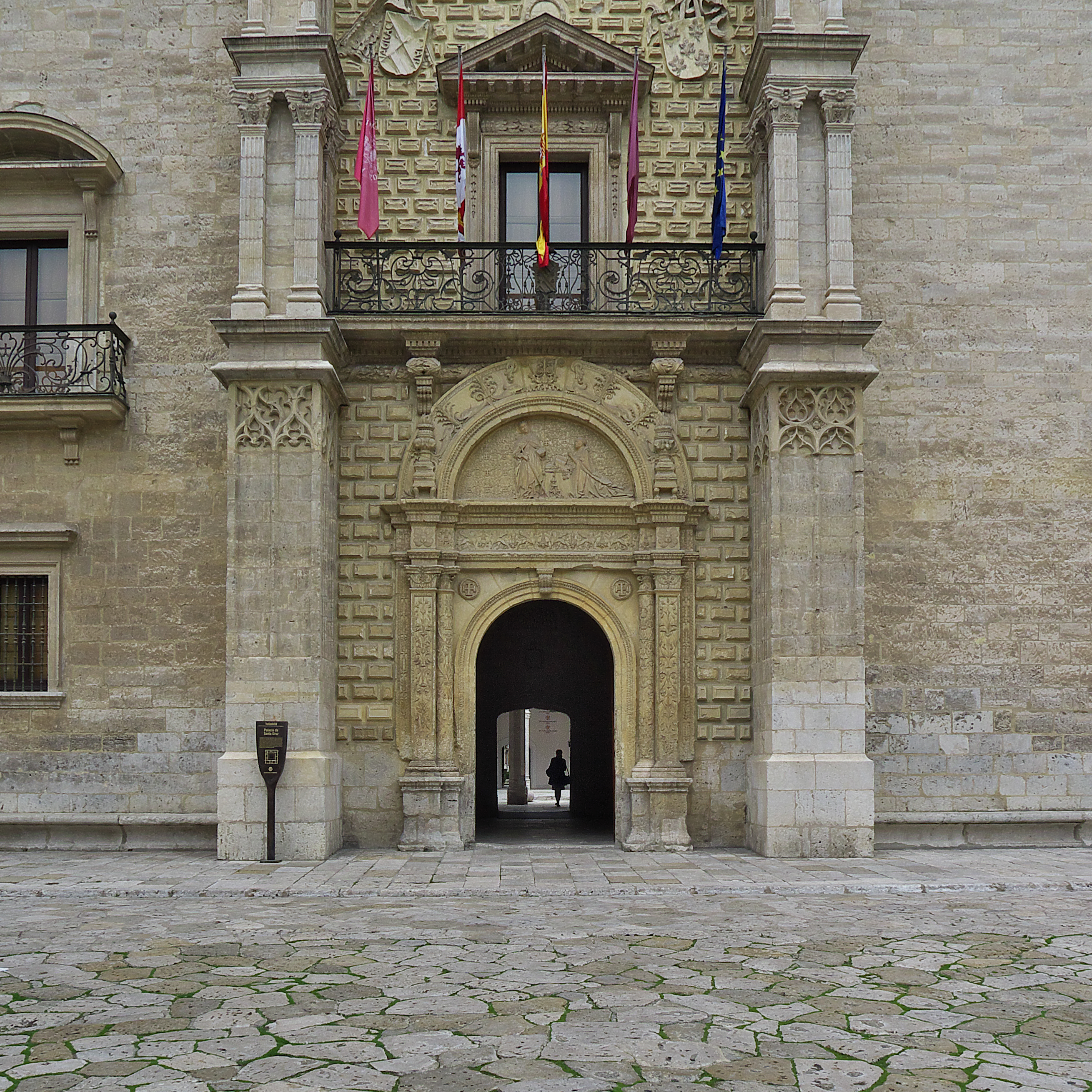 Lorenzo Vázquez de Segovia introduce el arte renacentista en Valladolid con esta portada (1490).